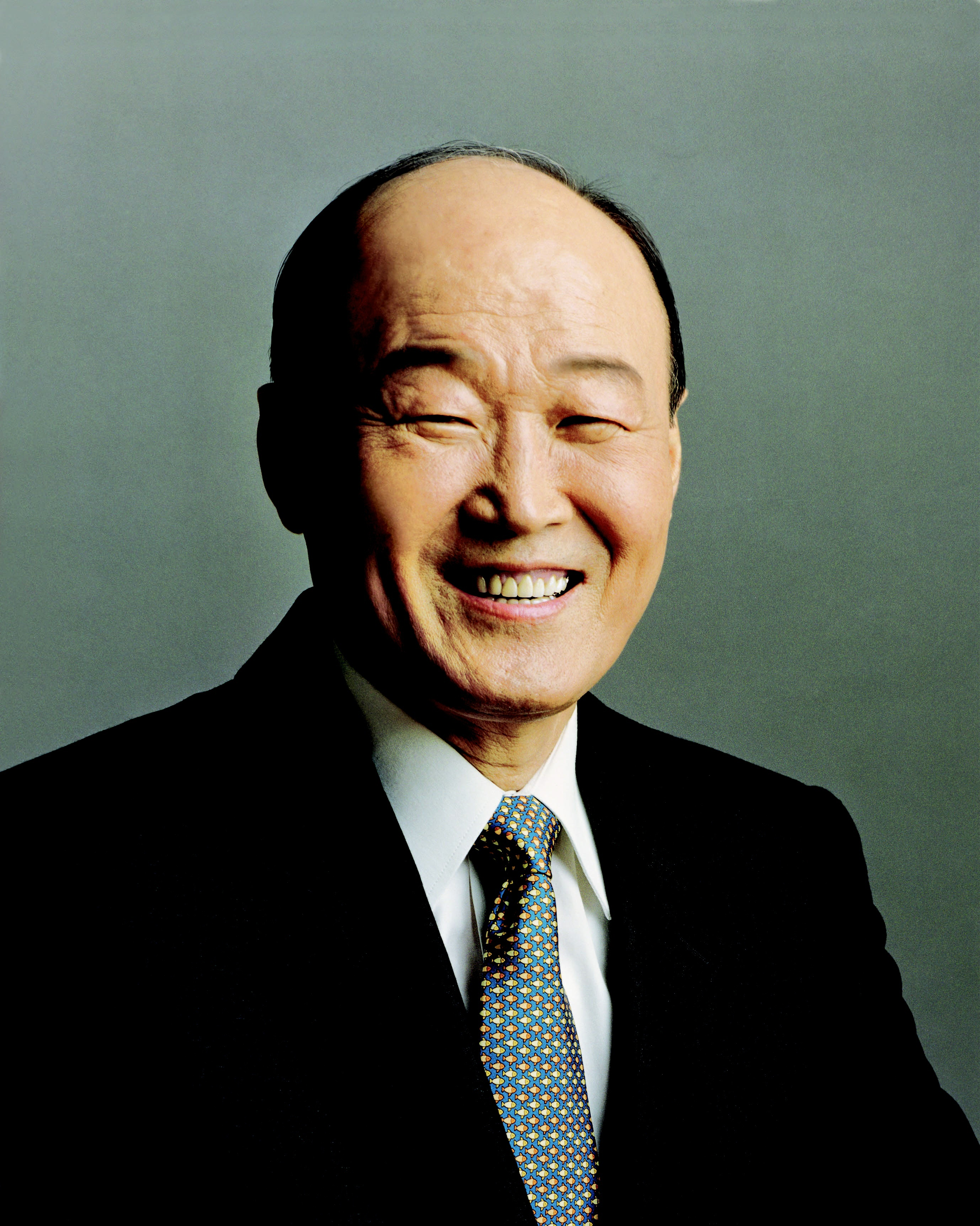 현대산업개발 故정세영 명예회장